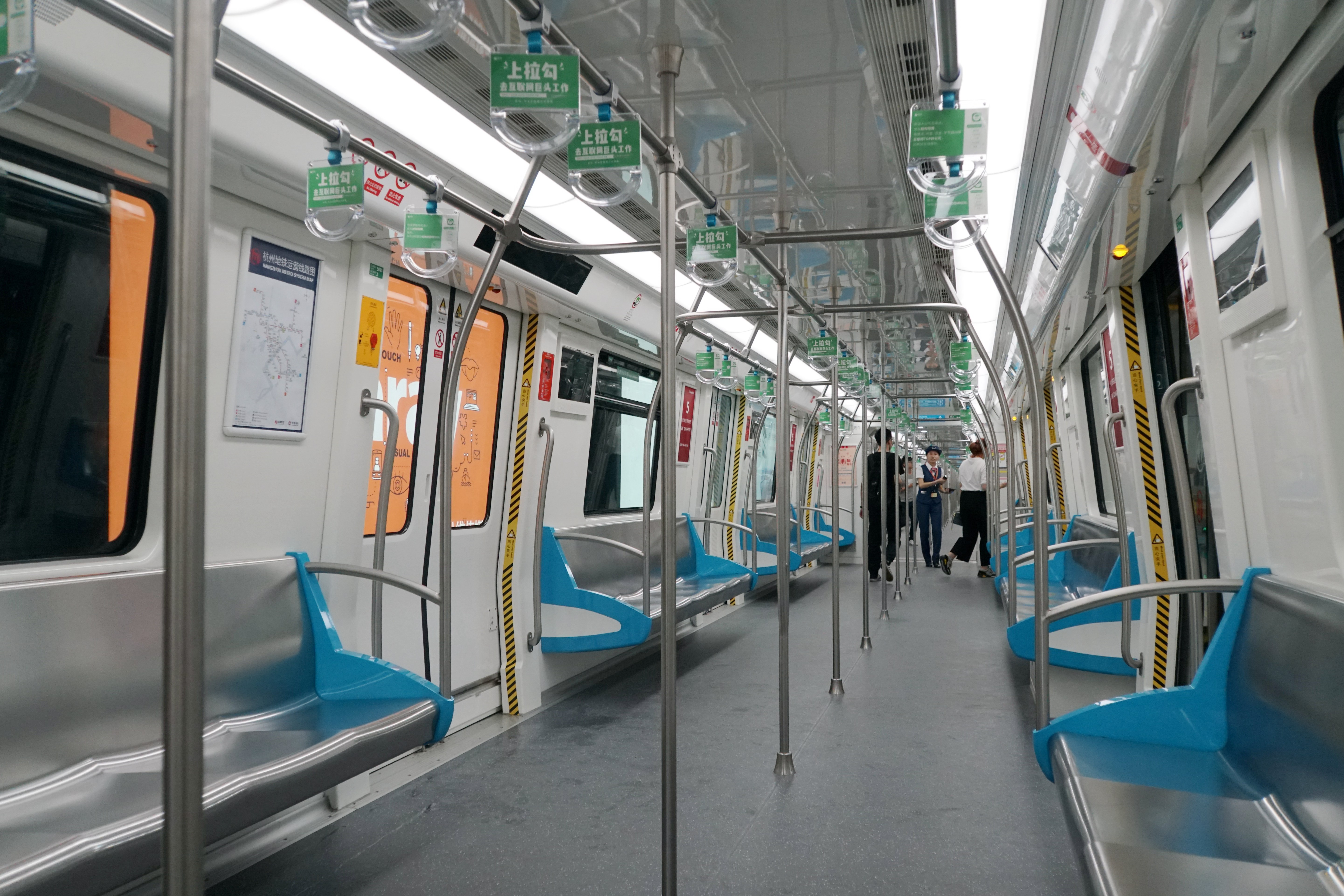 5号线列车内部